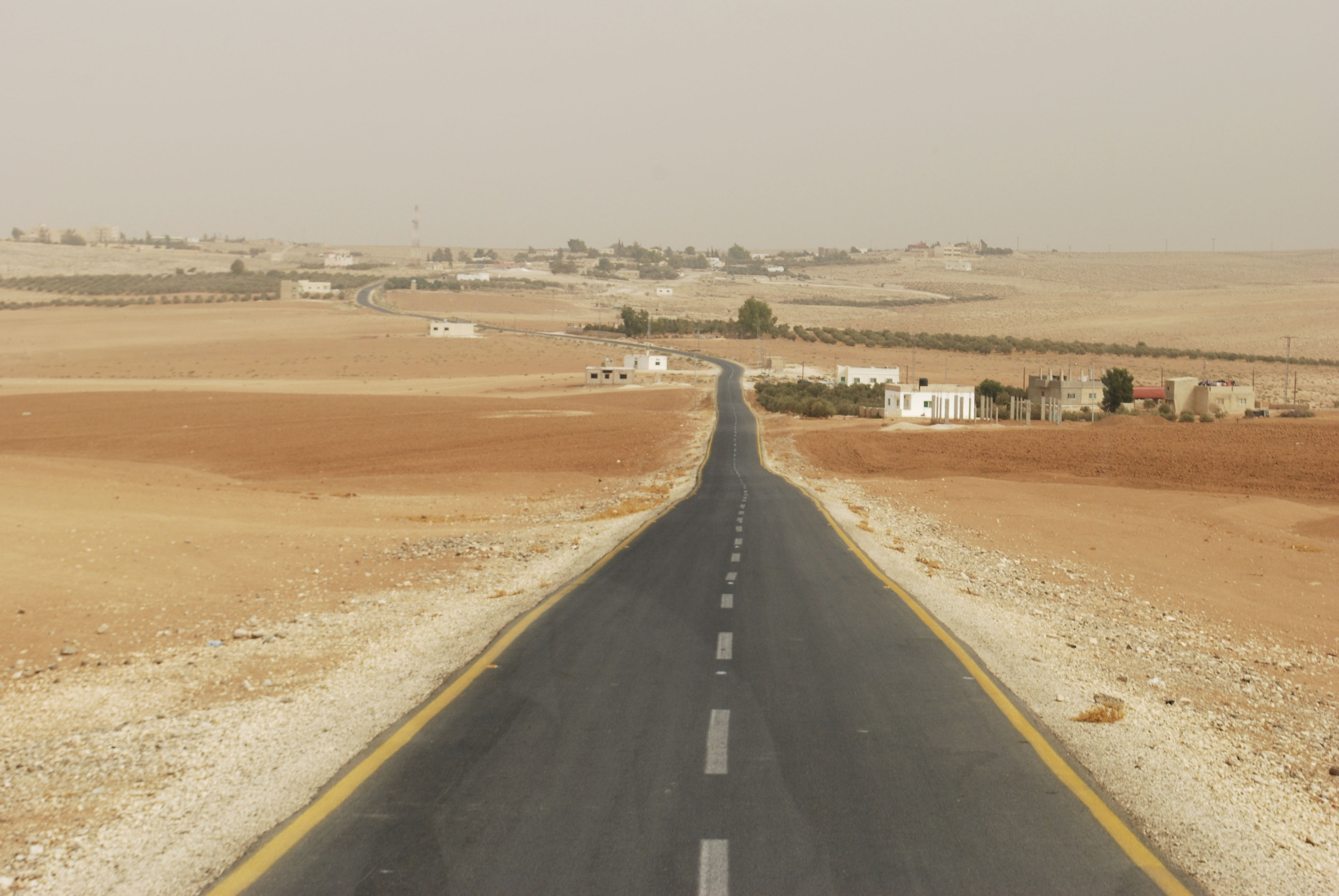 La route de Madaba à Umm ar-Rassas.